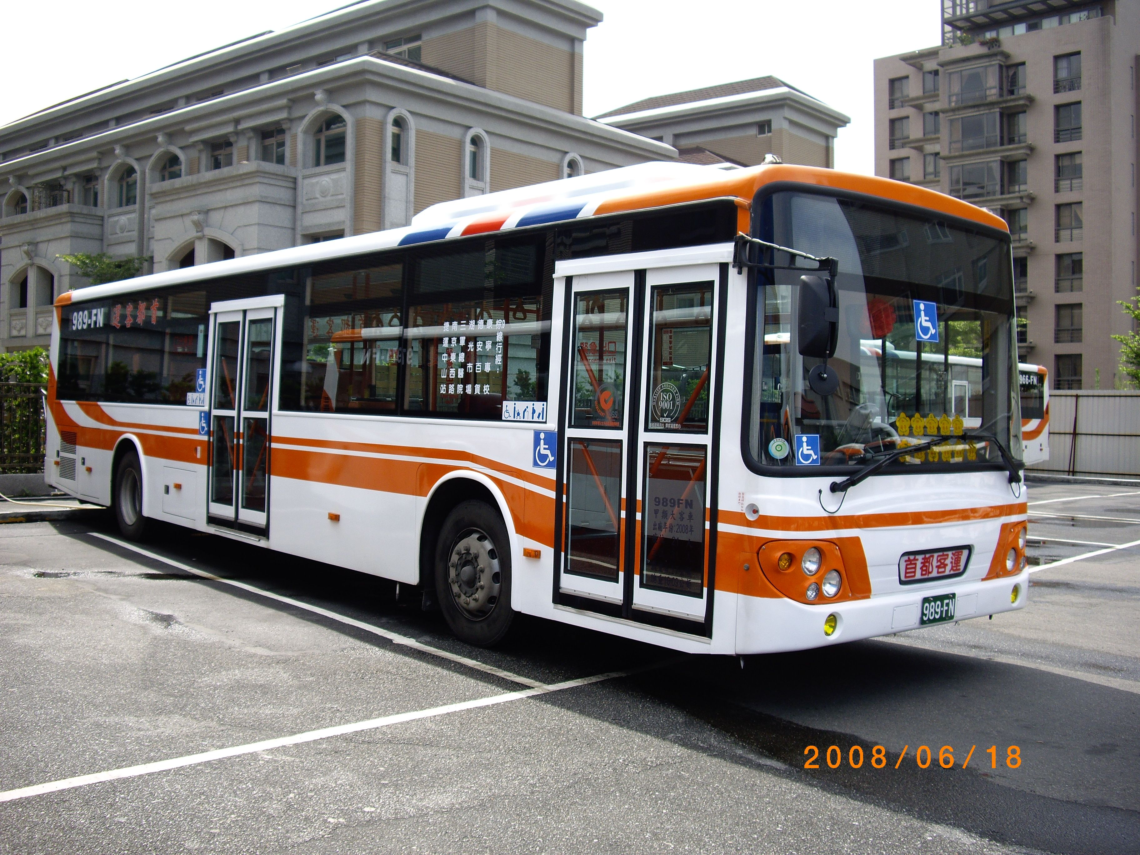 首都客運2008年Daewoo BS120CN大客車989-FN。